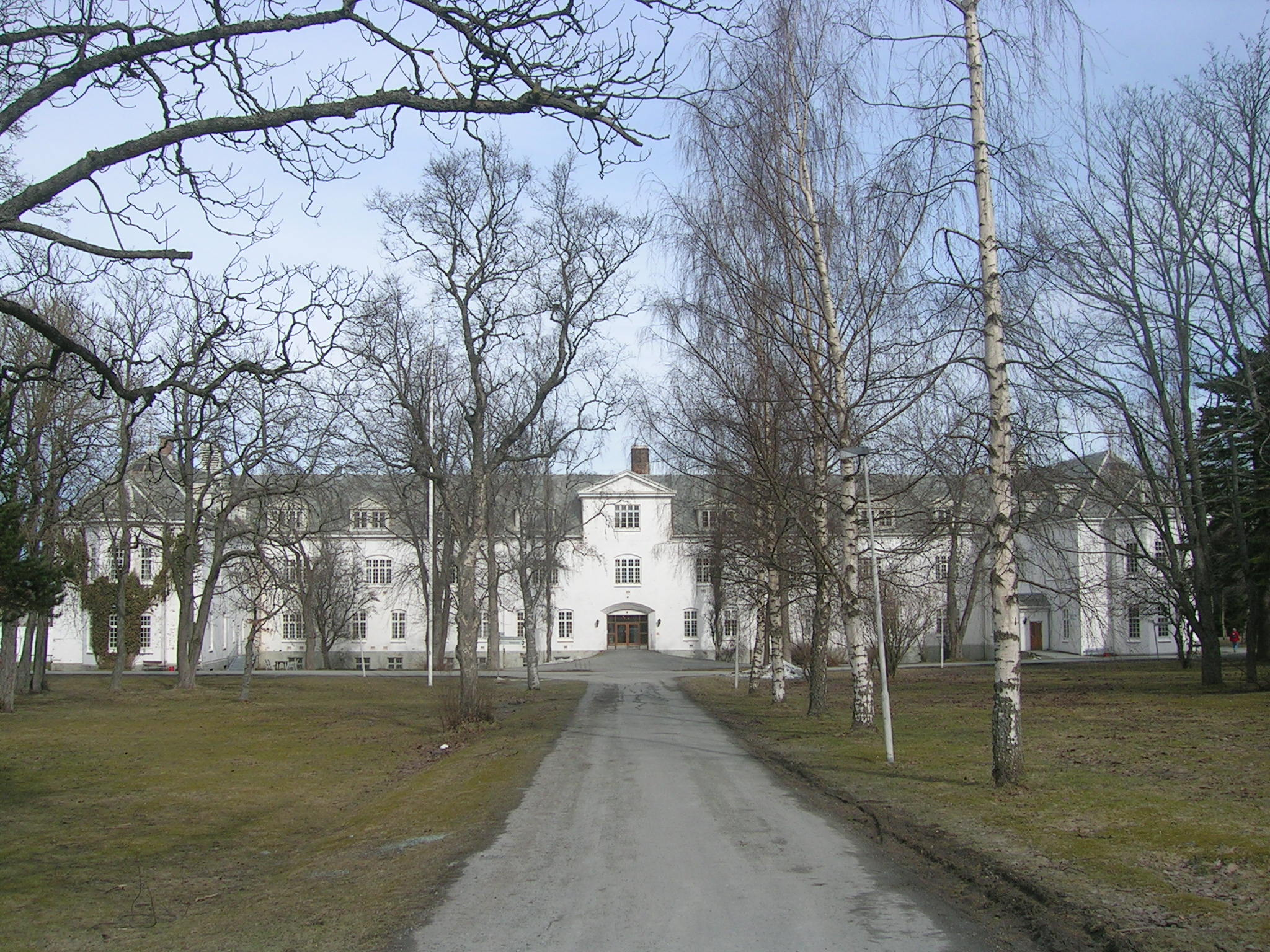 Entrance of Reitgjerdet, Trondheim, Norway